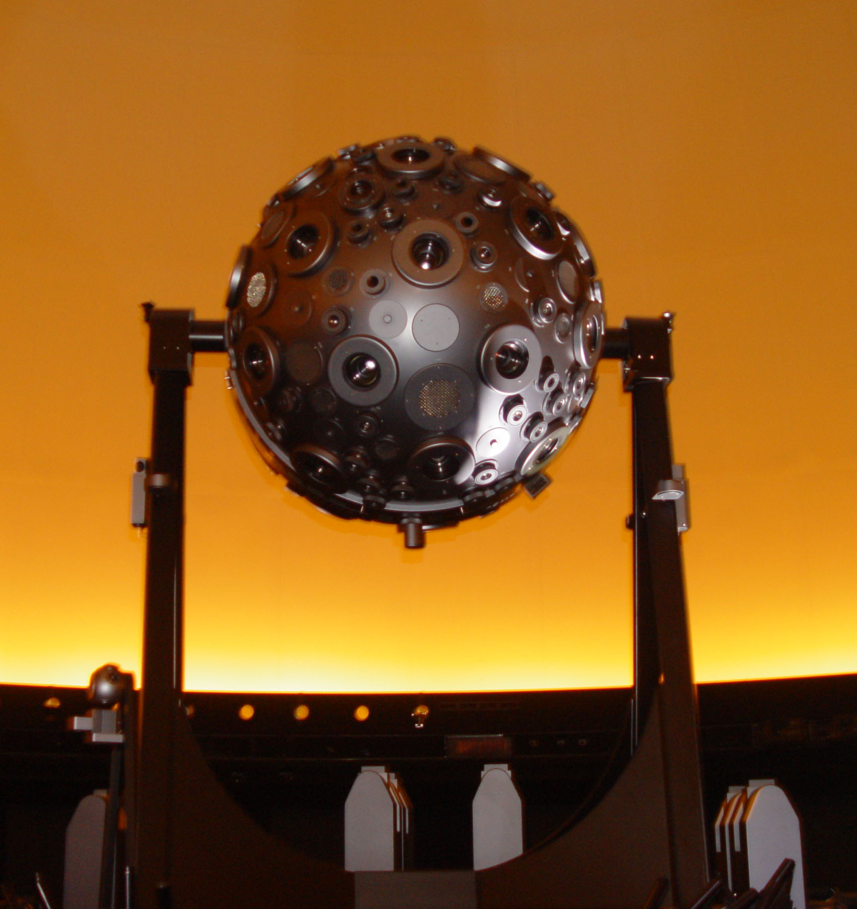 Moderner Carl Zeiss Projektor